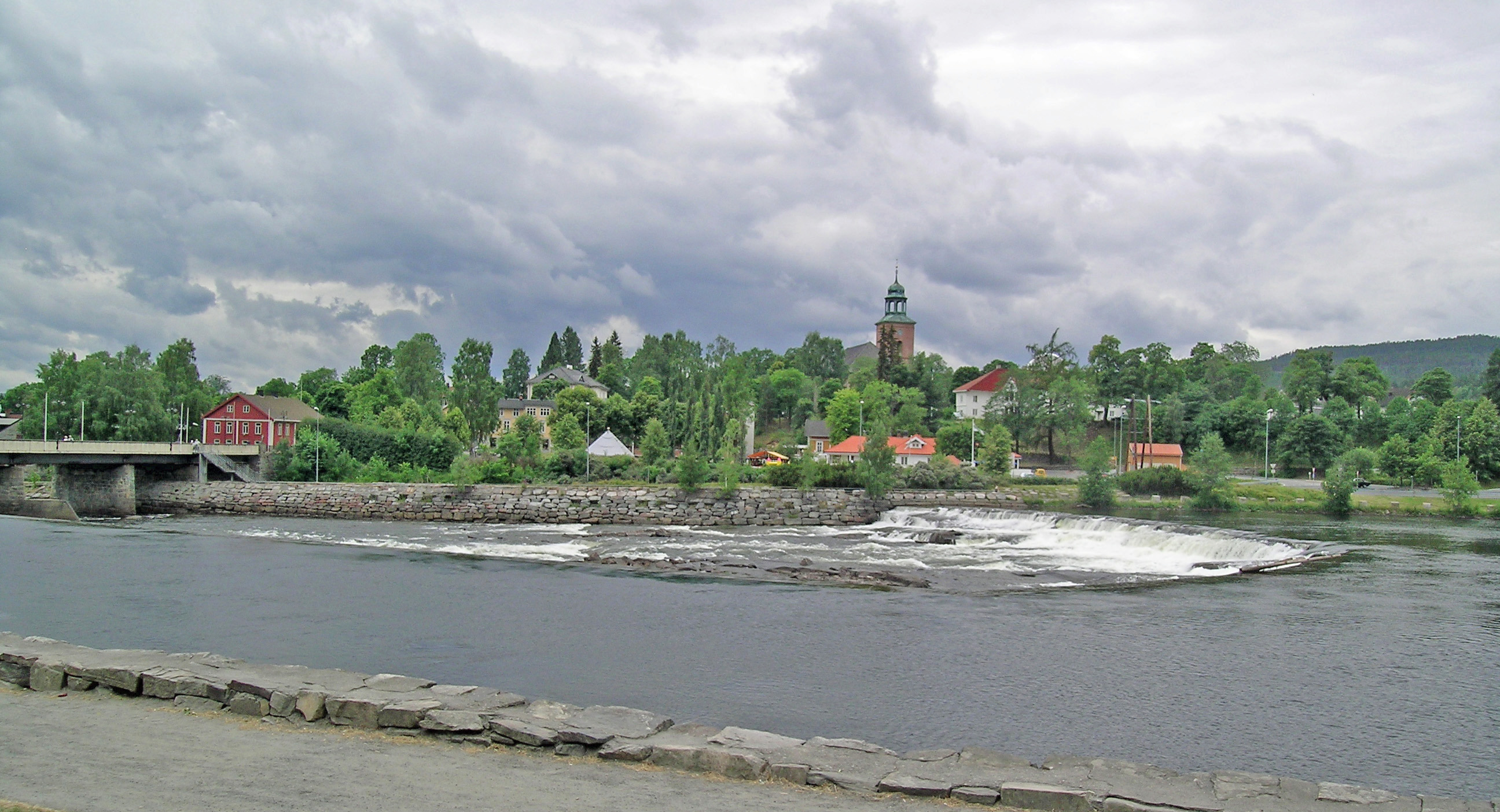 Kongsberg. Numedalslågen, Nybrufossen and Vestsida. Nybrua to the left. Kongsberg church and Bergskrivergården.